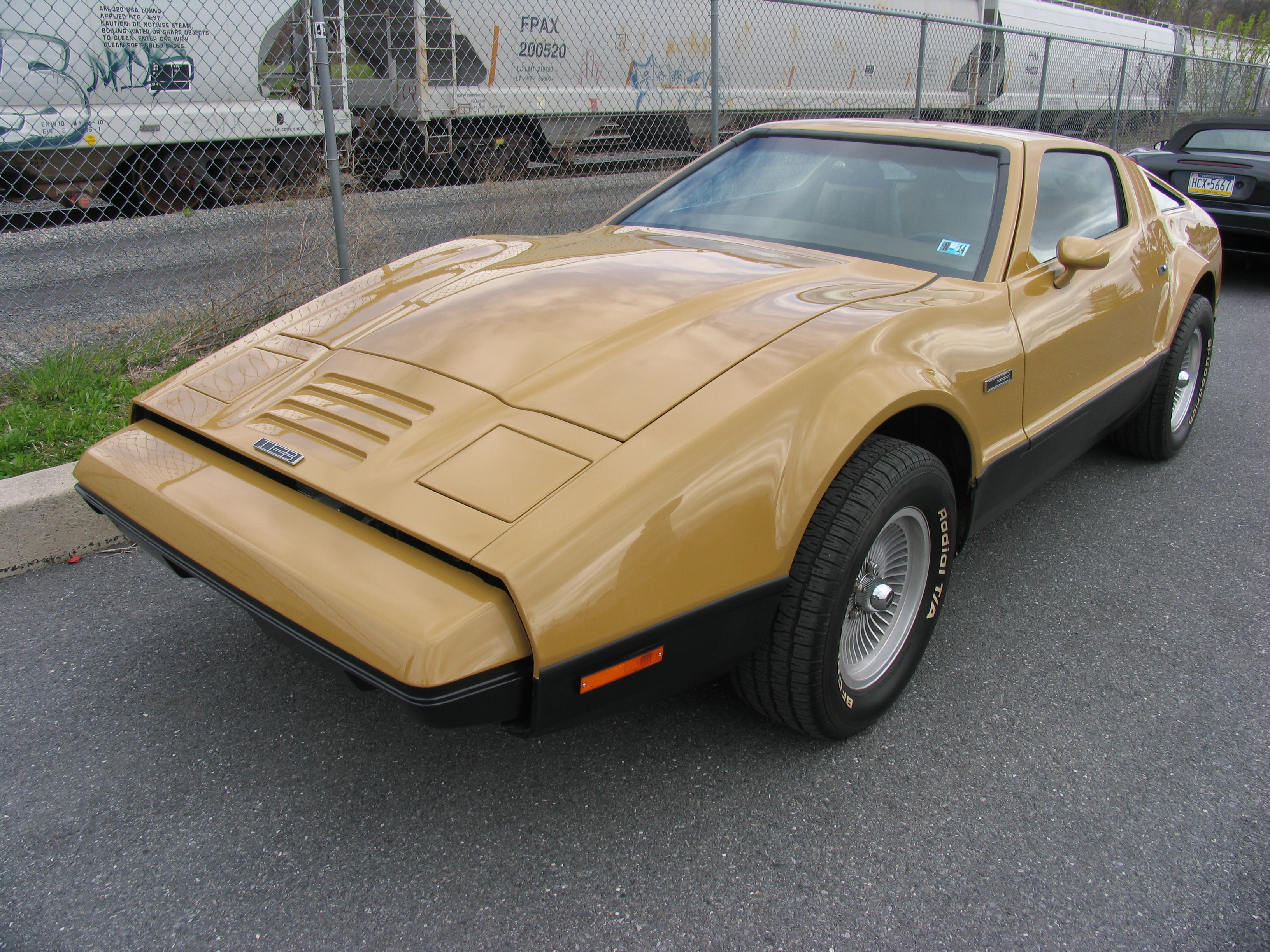 Bricklin SV1